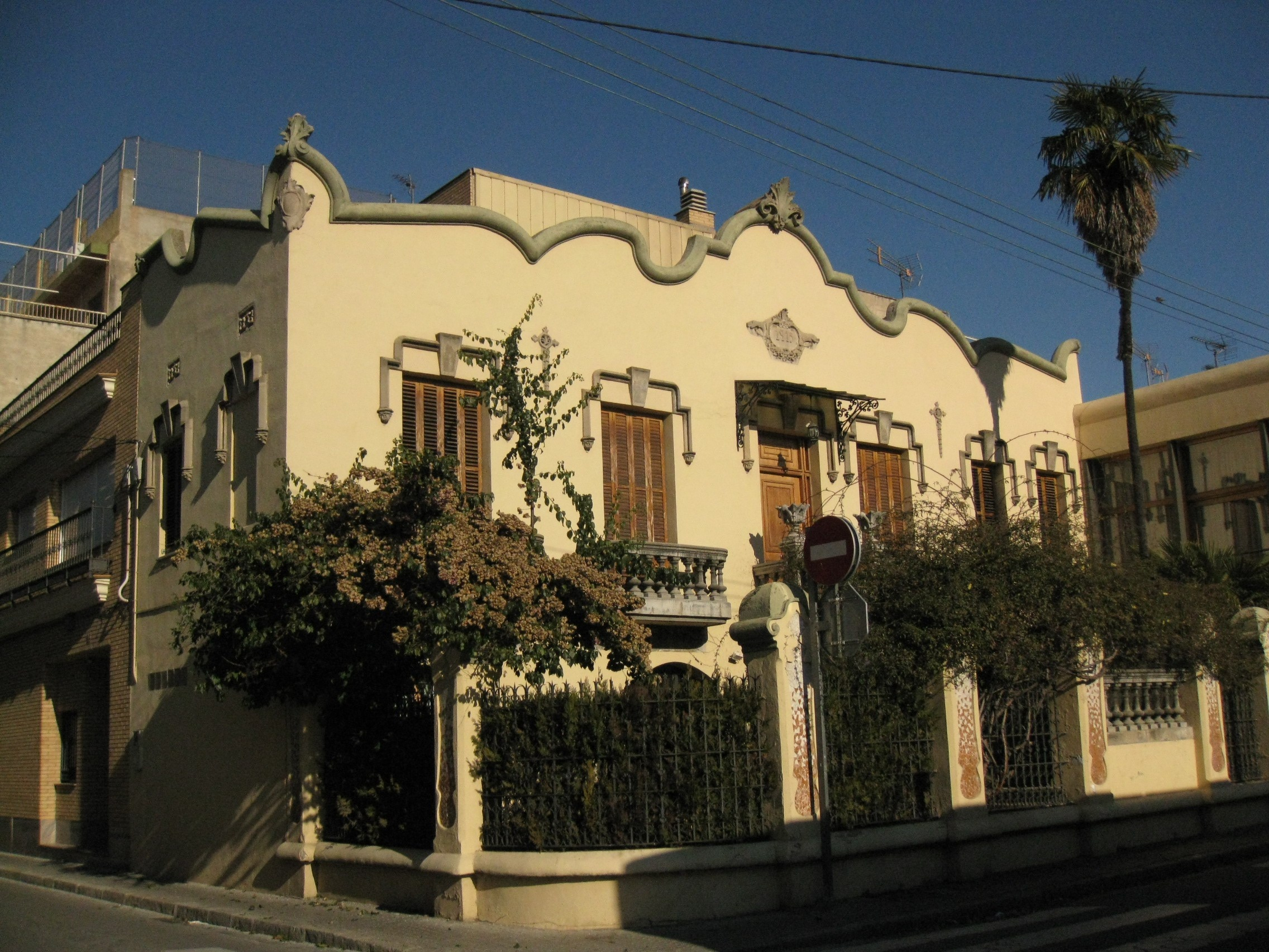 Habitatge al carrer d'Itàlia, 4 (Mollet del Vallès)